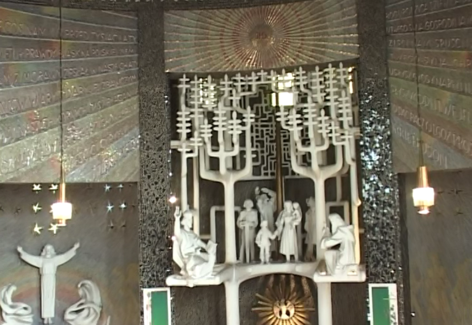 Widok na Drzewo Chrześcijaństwa w kościele pw. św. Cyryla i Metodego w Knurowie